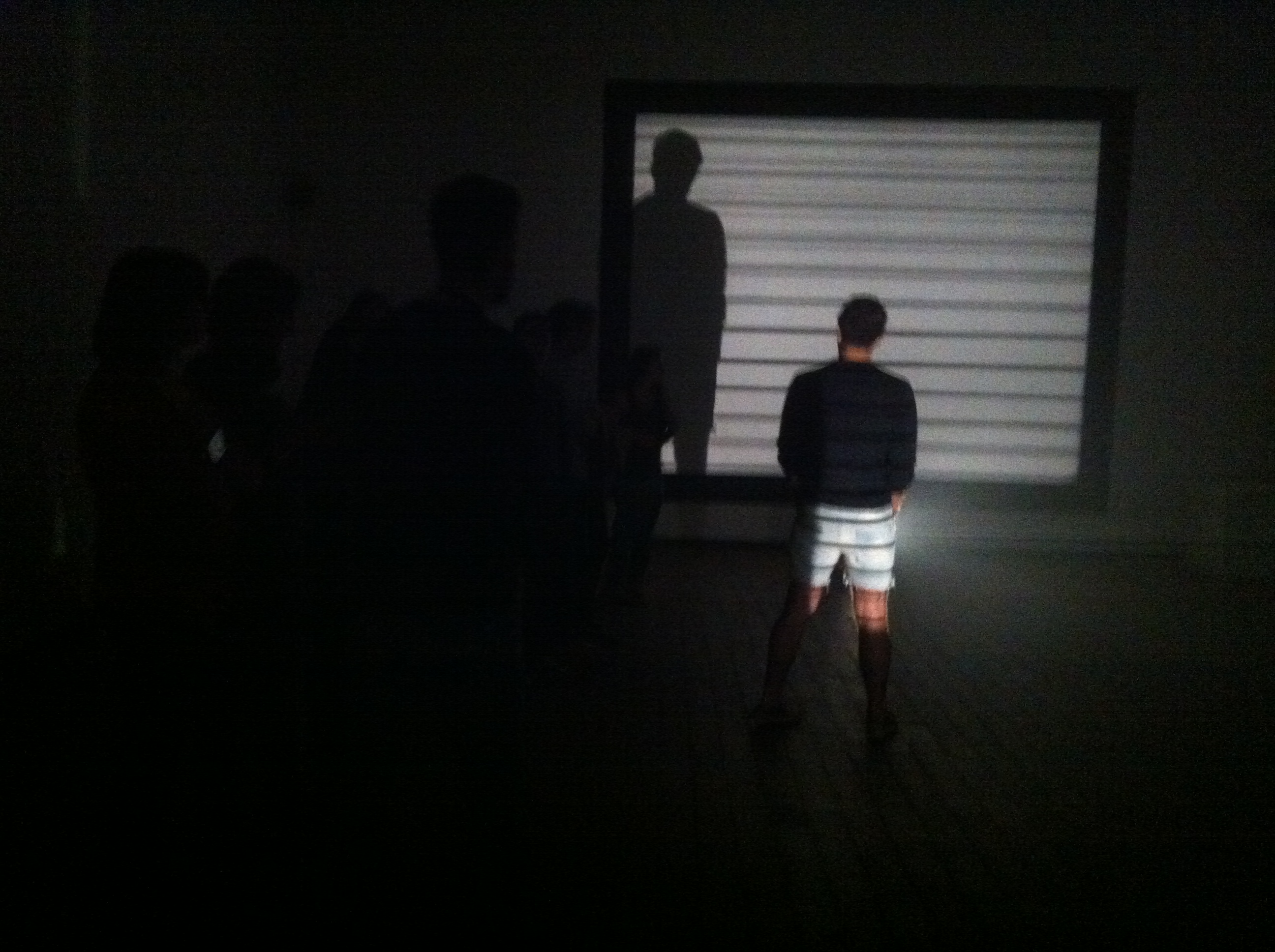 Visita a l'exposició Insomnia durant la Viquimarató 35 hores, 35 anys Espai 10 i Esapi 13